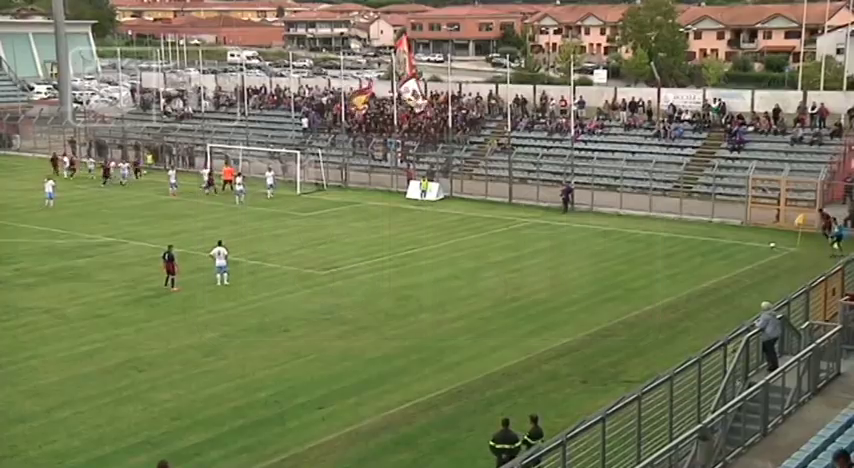 Partita di calcio Rieti-L'Aquila, terminata 1-1, terza giornata del campionato di serie D (girone G), disputata il 18 settembre 2016 allo stadio Centro d'Italia-Manlio Scopigno di Rieti